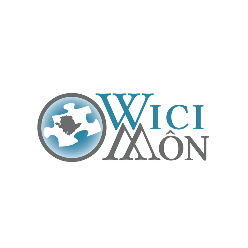 Logo WiciMon